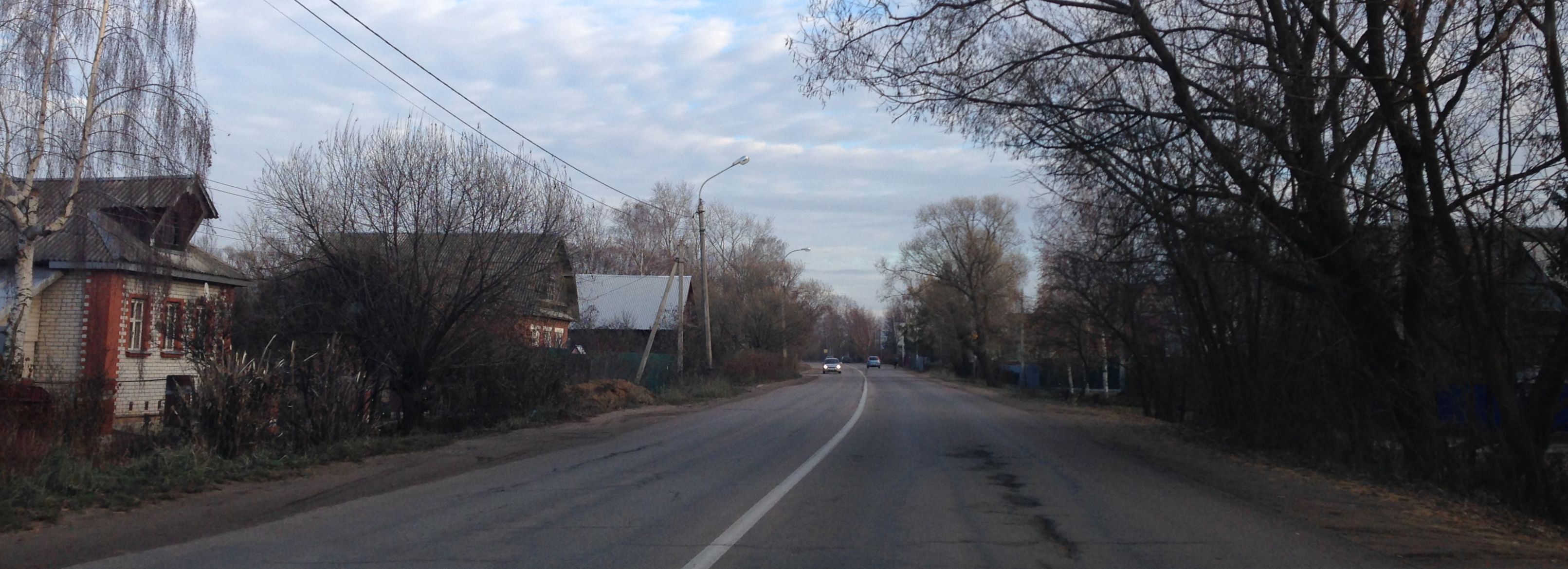 Посёлок Запрудня, микрорайон Гари, ул. Советская (Талдомский район, Московская область).